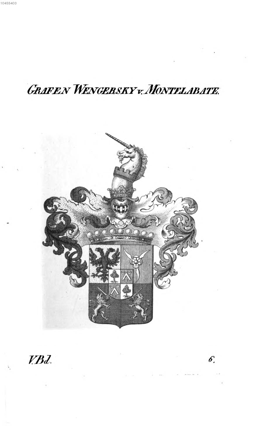 Wappen Wengersky von Montelabate - Tyroff AT.jpg